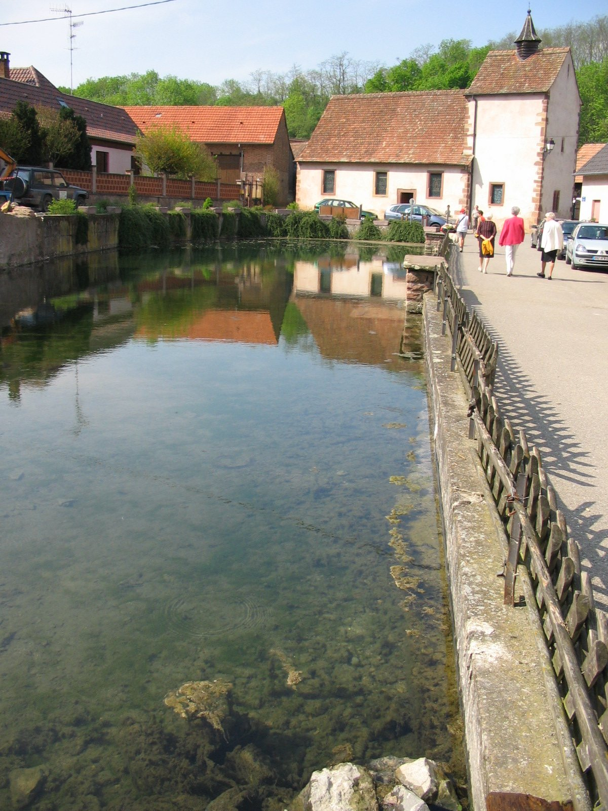 Kuttolsheim. Source sulfureuse utilisé par les thermes jusque dans les années 50 et comme lavoir à chevaux. Au fond, la chapelle Sainte Barbe du 13è siècle (tour) - 17è siècle (nef).